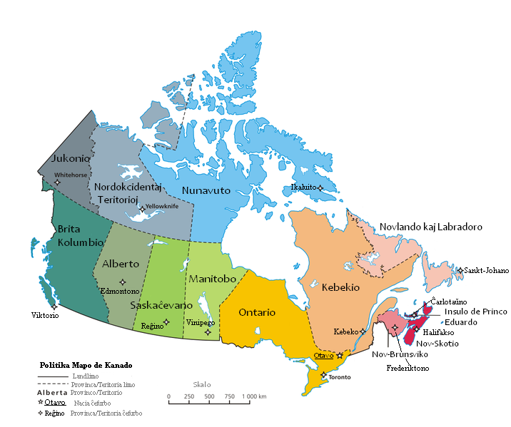 Mi mem esperantigis ĉi tiun liberan mapon de la kanadaj provincoj kaj teritorioj.